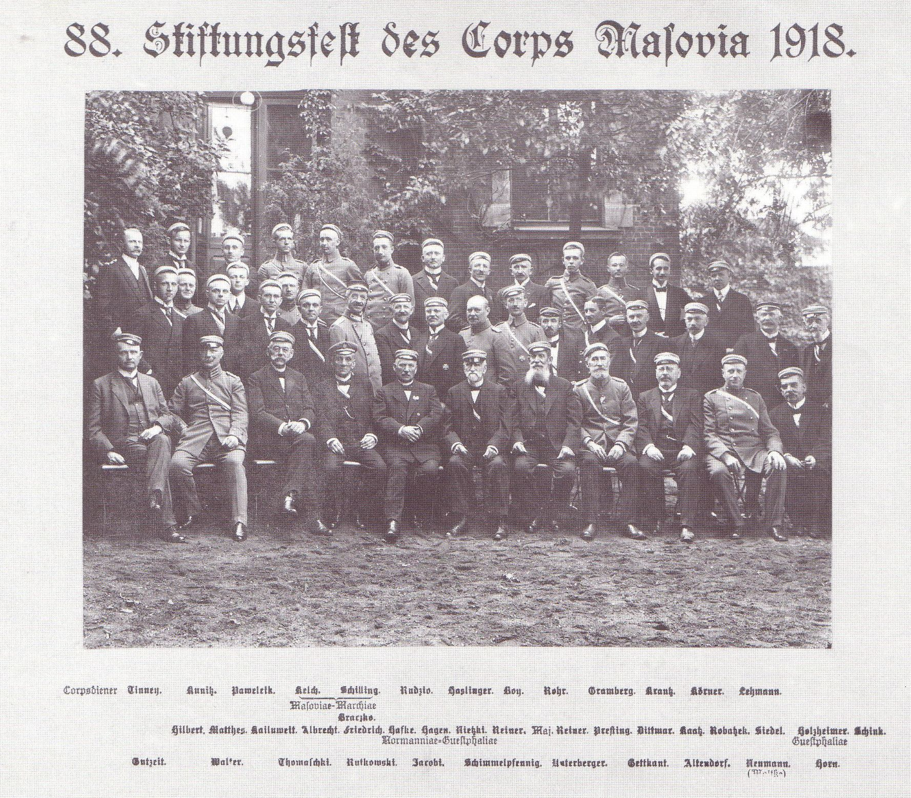 Fotografie vom 88. Stiftungsfest des Corps Masovia, Königsberg 1918